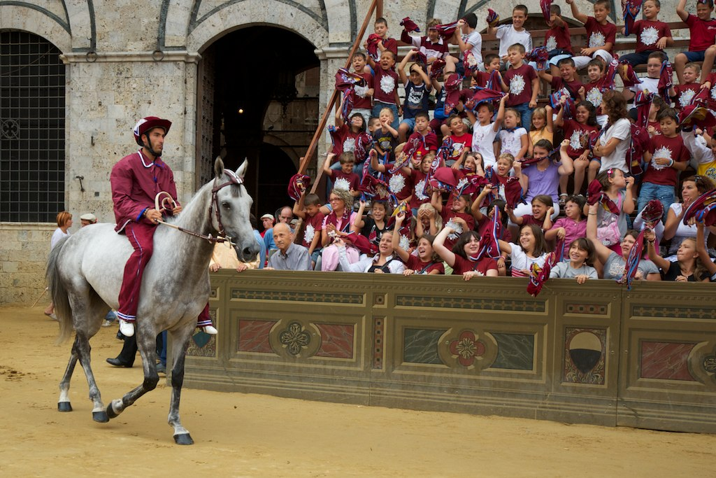 I bimbi della Torre salutano l'accoppiata che difende i loro colori ad una prova del Palio dell'Assunta 2011